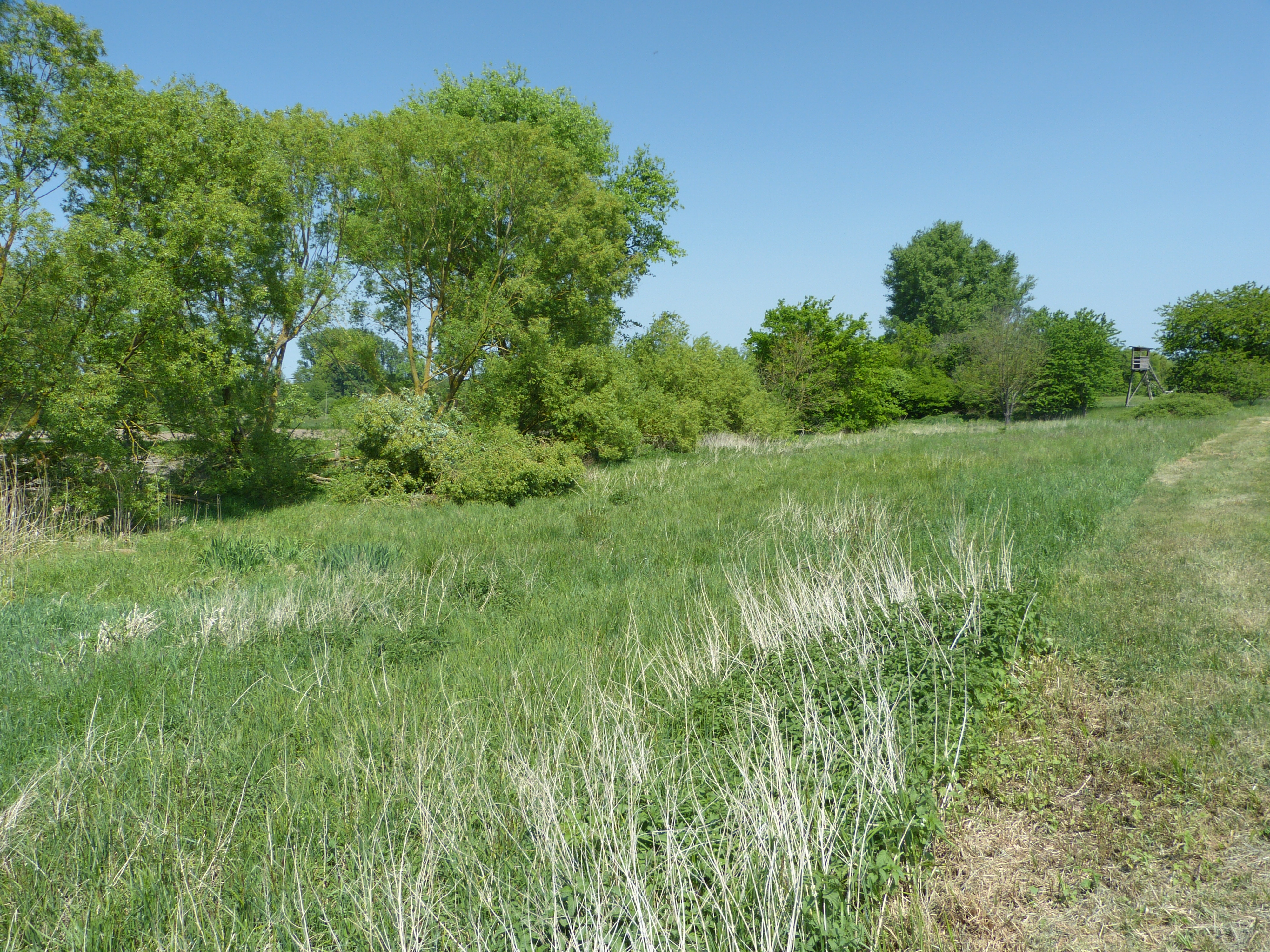 NSG Woogwiesen, am Hainbach (Dudenhofen/Harthausen)